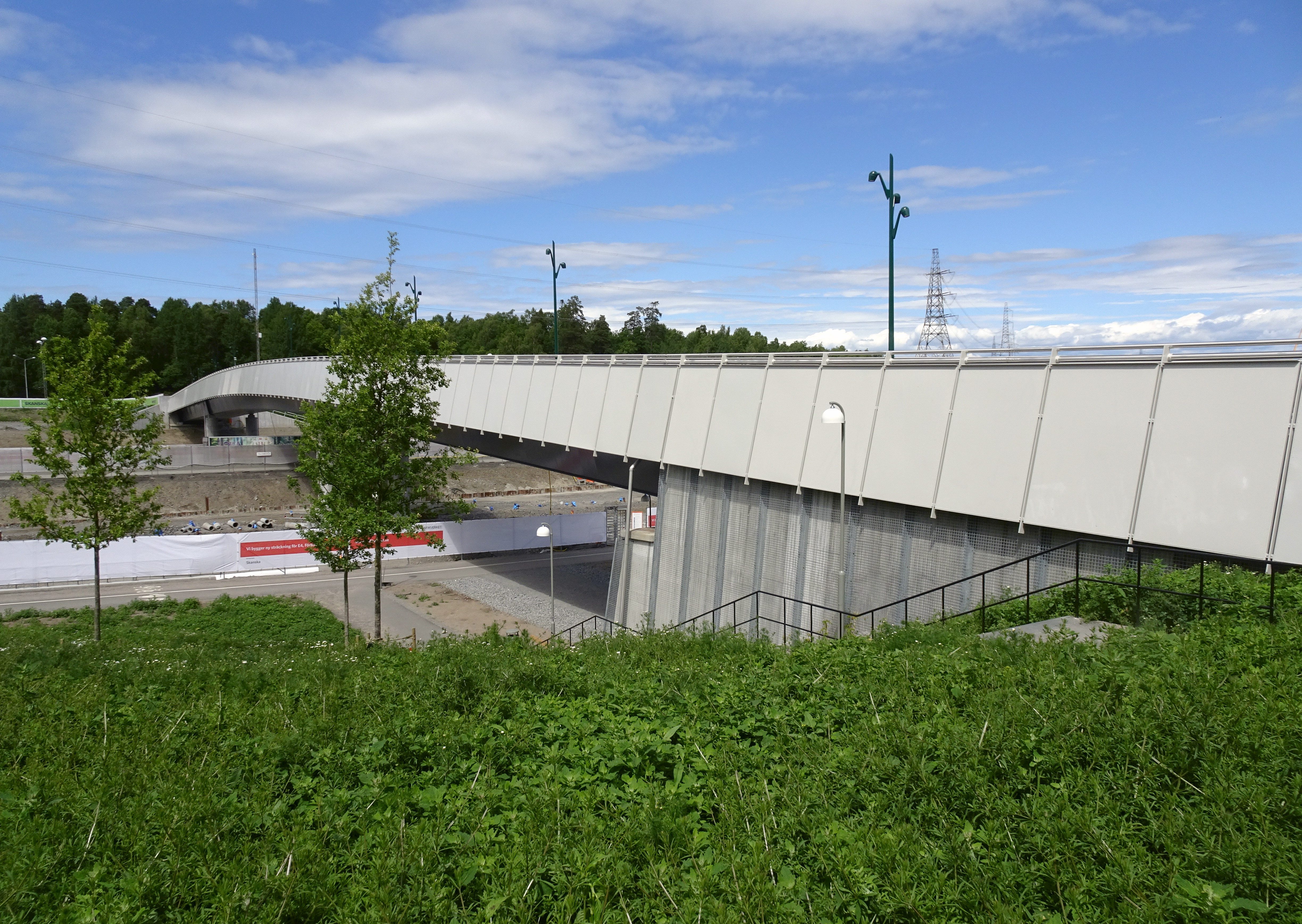 Sadelmakarbron, sedd från Stockholmssidan